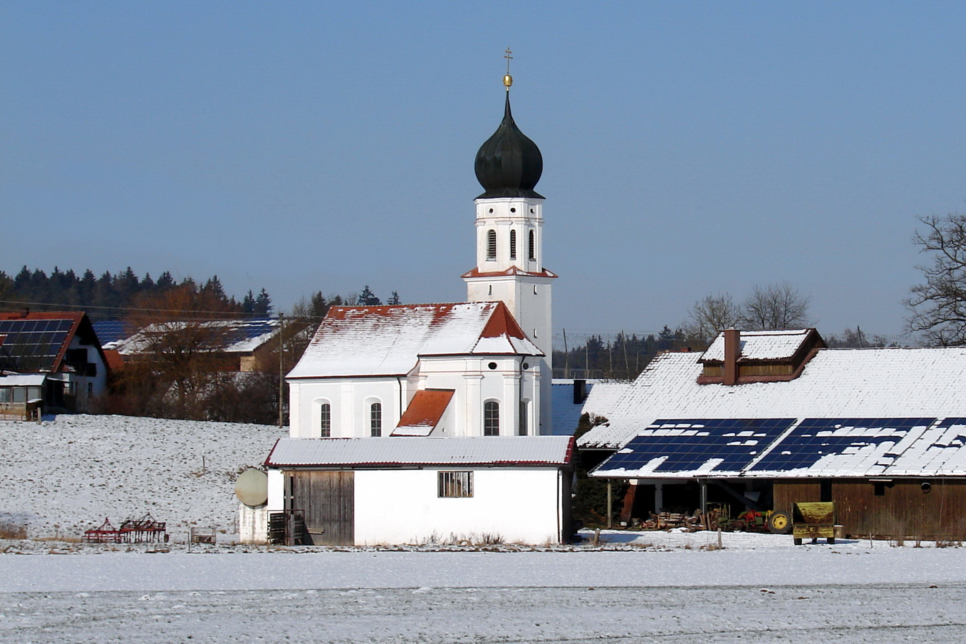 Kath. Filialkirche St. GeorgThis is a photograph of an architectural monument.